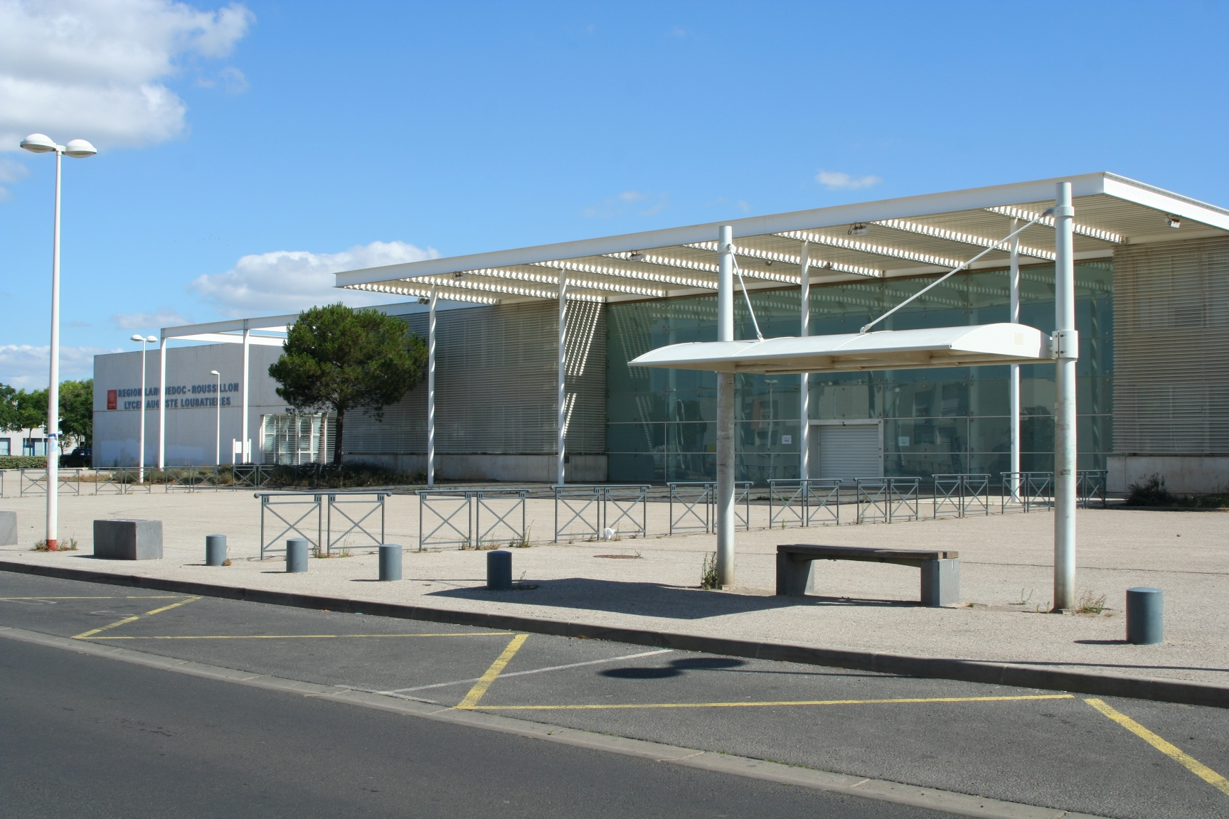 Lycée Auguste Loubatières à Agde (Hérault - France)